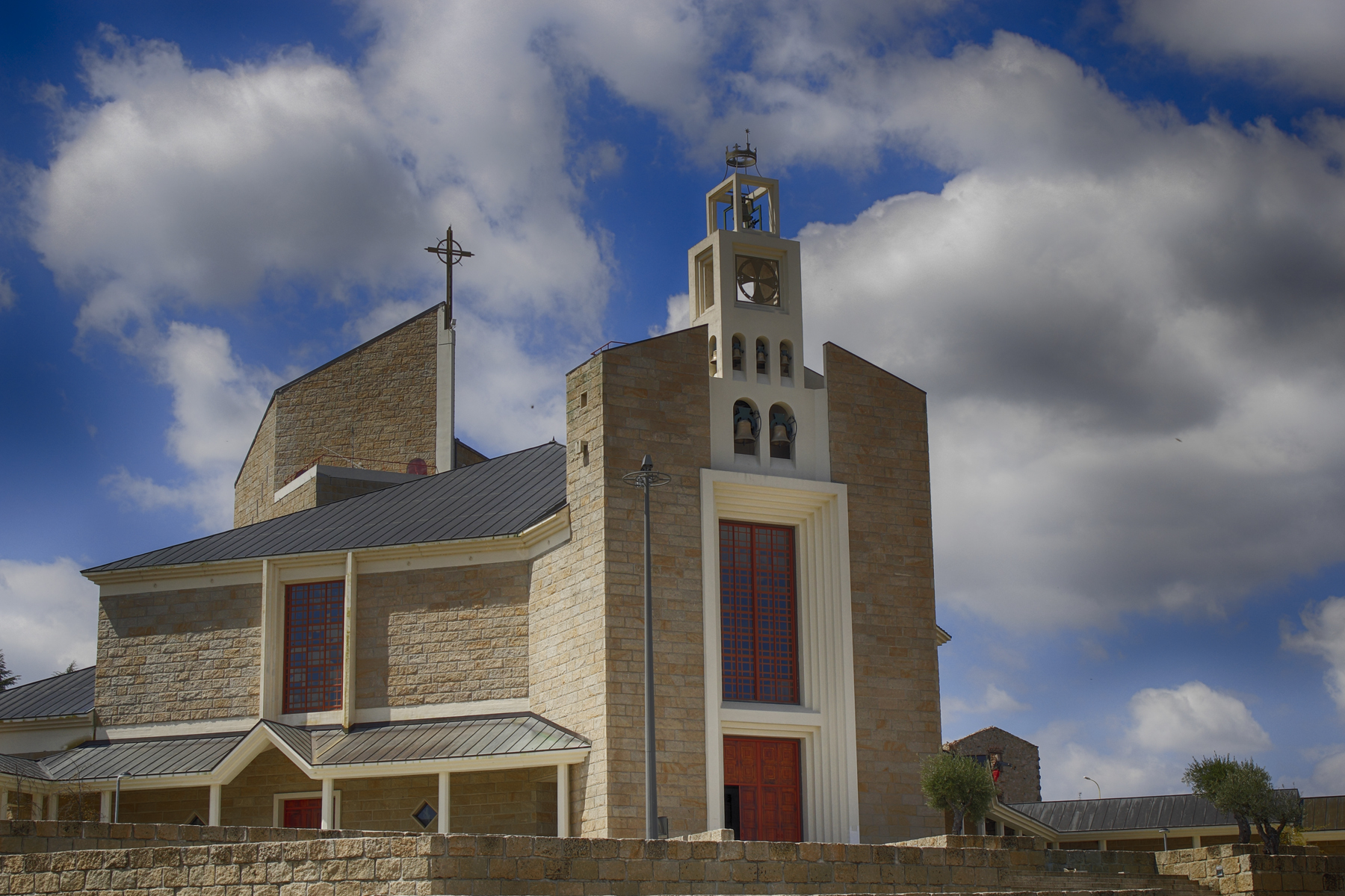 Catedral de Nuestra Señora Reina (Igreja Catedral de Nossa Senhora Rainha), año 2001. Conocida como Catedral del Milenio. Diseñada por el arquitecto Baçal Rosa, es la primera catedral construida en Portugal en los últimos 4 siglos. Avenida Engenheiro Amaro da Costa Braganza (Bragança) Distrito de Braganza Portugal